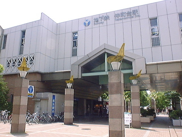 Nakamachidai Station, Yokohama Municipal Subway Blue Line, Tsuzuki-ku, Yokohama, Japan